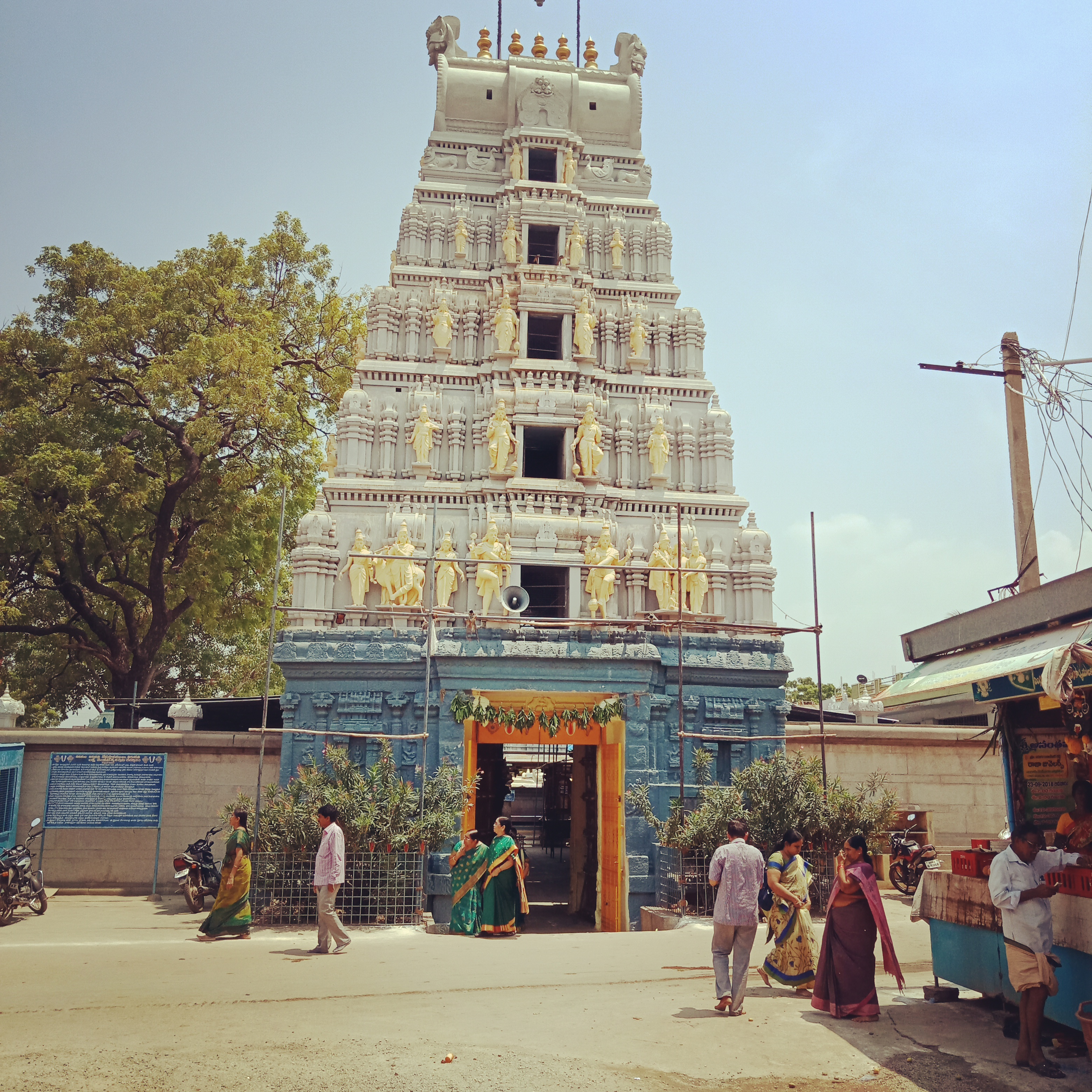 వై.యస్.ఆర్. కడప జిల్లా, పాత కడప గ్రామంలో దేవుని కడప శ్రీలక్ష్మి వెంకటేశ్వరాలయం అనే పేరుతో ఈ ఆలయం ఉంది. ఈ ఆలయంలోని వేంకటేశ్వరస్వామి సాలగ్రాంని కృపాచార్యులు ప్రతిష్ఠించారని ప్రతీతి.ఈ ఆలయం మూలంగా ఈ ప్రాంతానికి దేవుని కడప అని పేరు వచ్చింది. దేవుని కడప గడప క్షేత్రం తిరుమలకు తొలిగడపగా ప్రసిద్ధిగాంచింది. దక్షిణ ప్రాంత యాత్రికులు కాశీ వెళ్ళడానికి, తిరుమల వేంకటేశ్వరుని వద్దకు కాలిబాటన వెళ్ళేవారికి, ఉత్తర భారతదేశ యాత్రికులు రామేశ్వరం వెళ్ళడానికి కడప ప్రధాన మార్గం. ఈ కారణంగా మూడుచోట్లకు వెళ్ళే భక్తులు కచ్చితంగా ఇక్కడ మొదటిగా శ్రీ లక్ష్మీప్రసన్న వేంకటేశ్వరస్వామిని దర్శించుకుని తరువాతనే పై మూడు క్షేత్రాలకు వెళ్ళేవారు. అందు వల్లనే మూడు క్షేత్రాల తొలి గడపగా దేవుని కడప గడపగా శ్రీ లక్ష్మీ వెంకటేశ్వరాలయం ఆలయం ప్రసిద్ధి చెందింది.